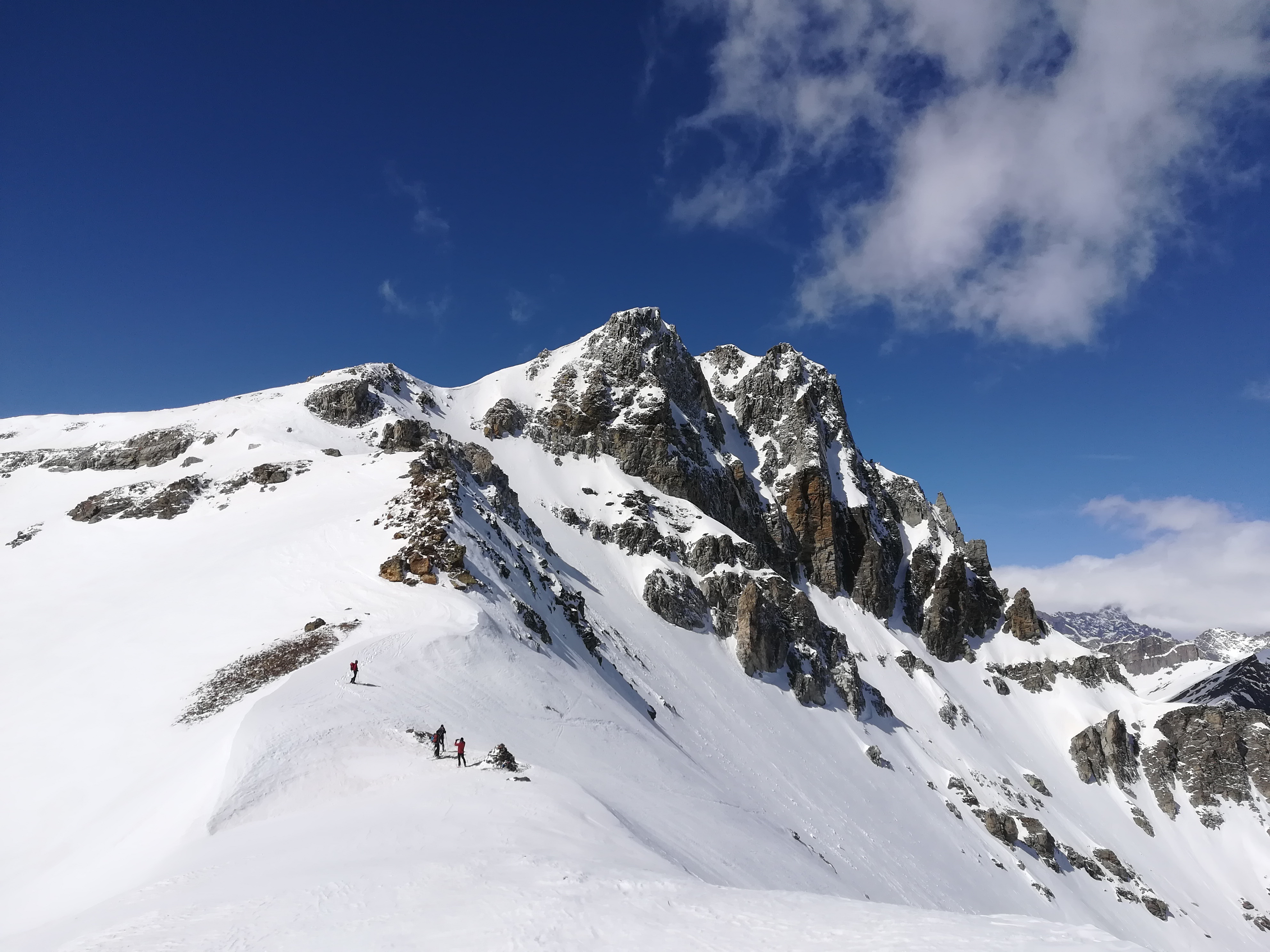 La Rocca La Marchisa vista dal colle Marchisa in primavera